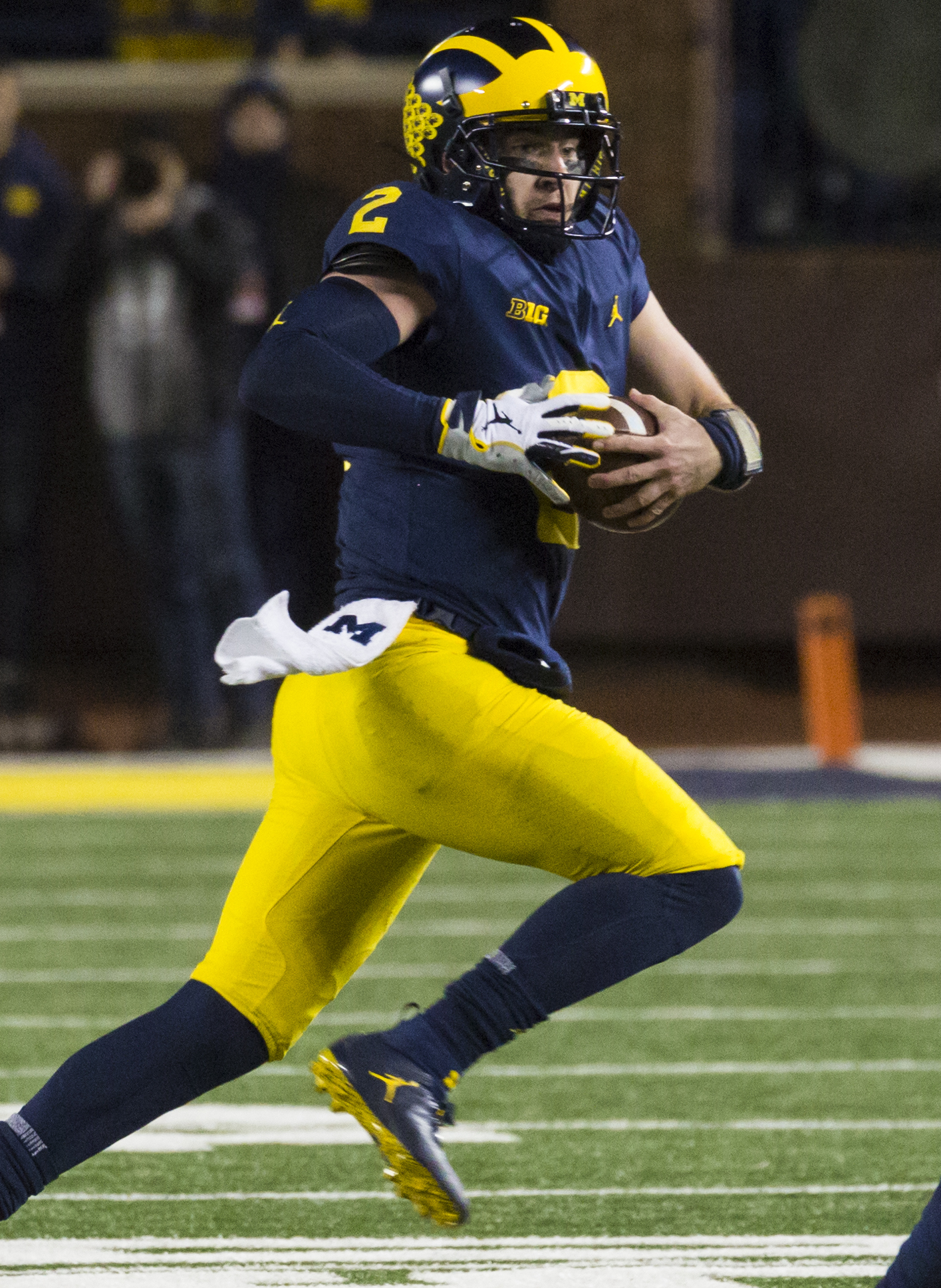 IX8A8486